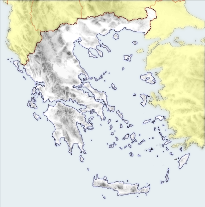 Kreeka asendi kaart